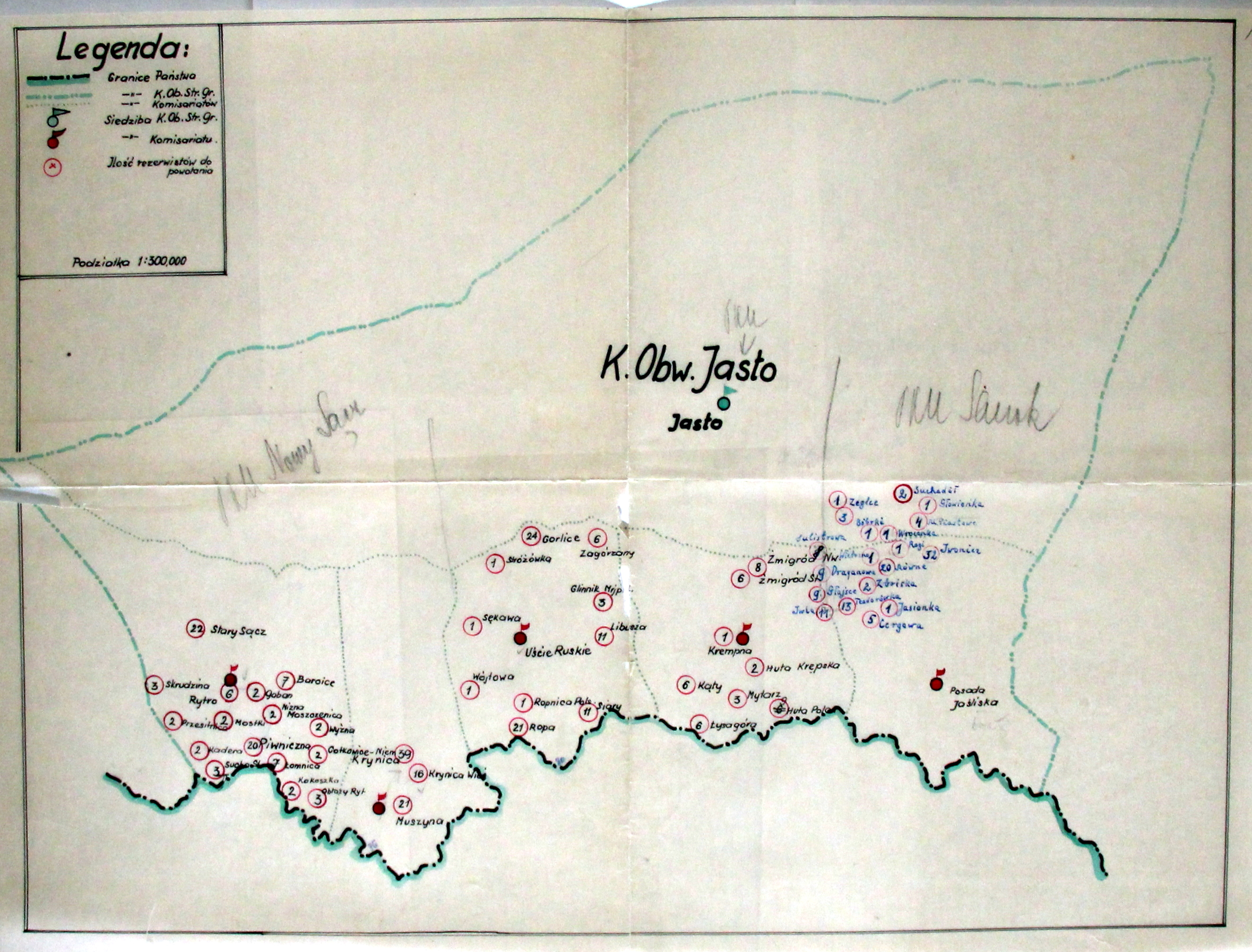 Szkic Obwodu SG Jasło - lata 30. XX wieku